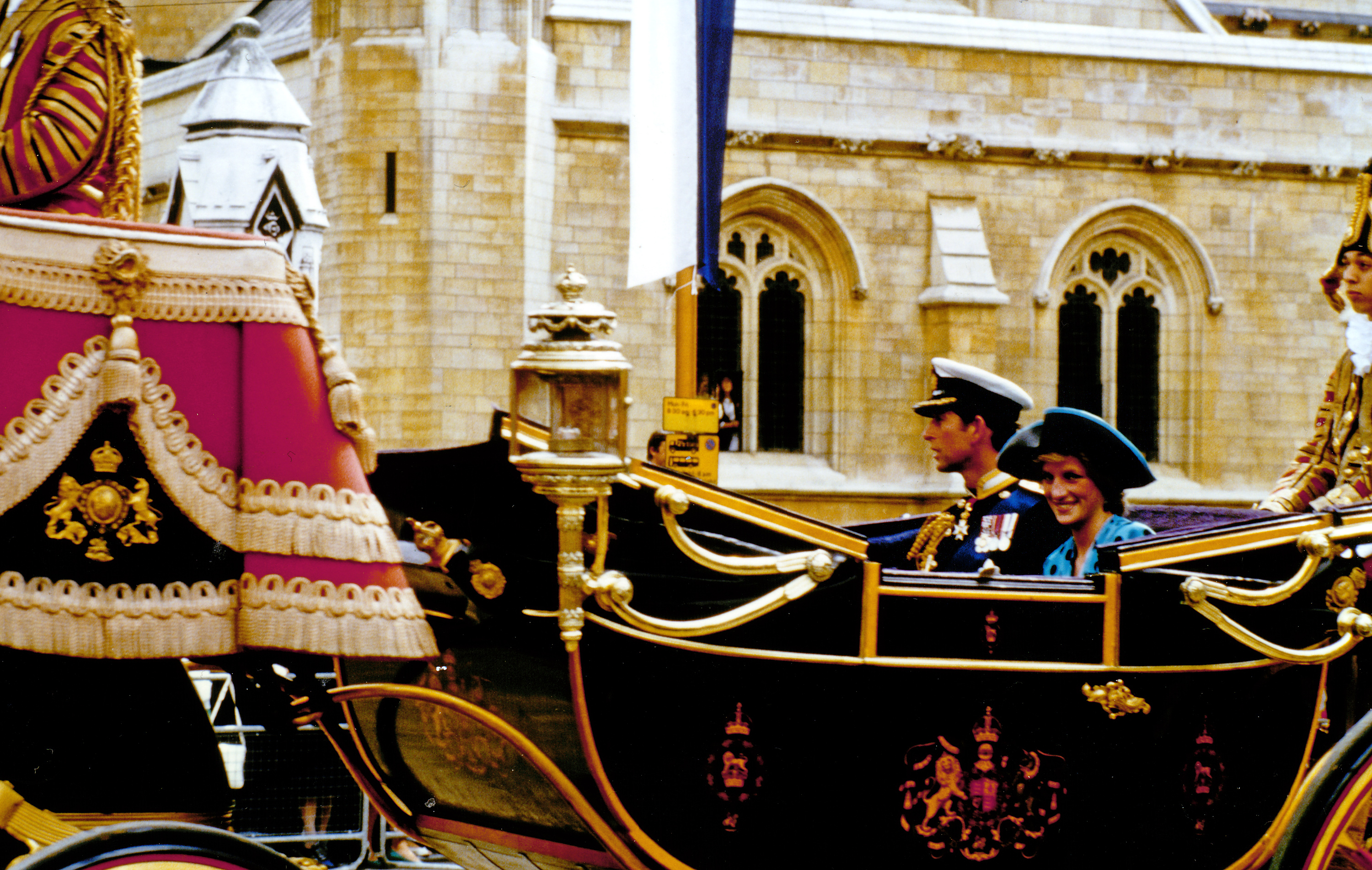 Korso nach der Hochzeit von Andrew Mountbatten-Windsor, Duke of York, und Sarah Ferguson in London, Westminster. Hier: Charles, Prince of Wales, und Lady Diana